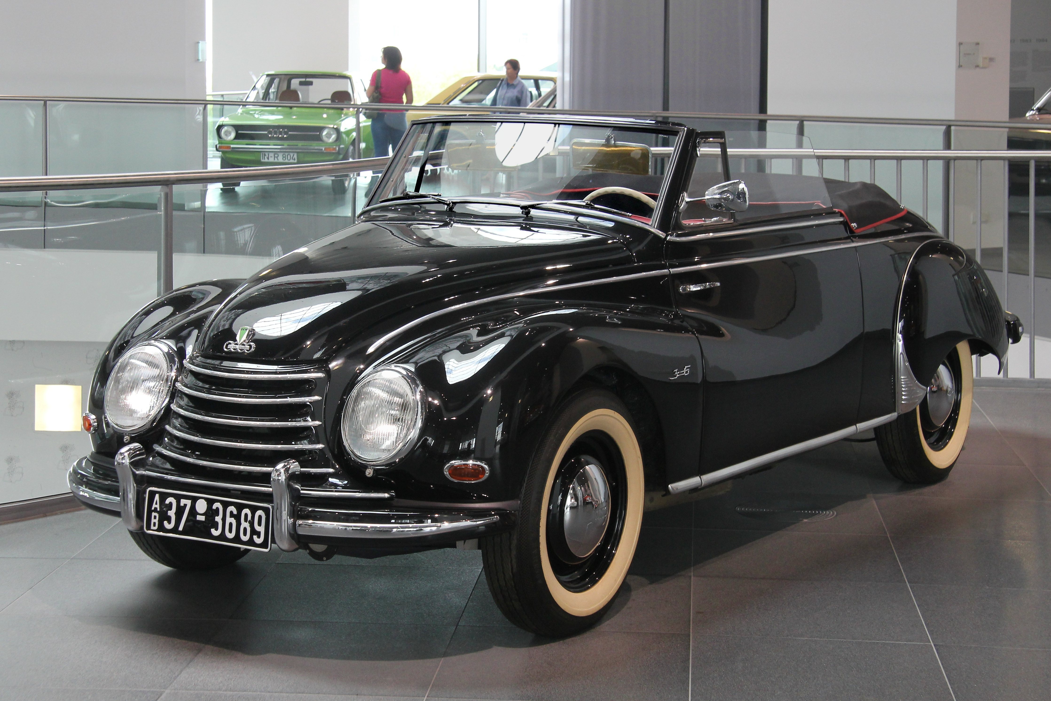 DKW Sonderklasse, Typ F 91, Cabriolet von Karmann, Baujahr 1953, im museum mobile in Ingolstadt. 3-Zylinder-Zweitaktmotor, 896 cm³, 34 PS bei 4000/min, Höchstgeschwindigkeit 115 km/h, Verbrauch: 9 l/100 km. 432 Stück wurden gebaut. Die Blinker waren bei dem zweisitzigen Cabriolet bereits serienmäßig; der Außenspiegel ist nachgerüstet.